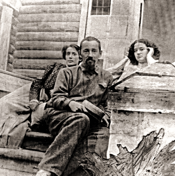 Egor Sozonov nella prigione di Akatuq, ritratto con Revekka M. Fialka e Marija Škol'nik